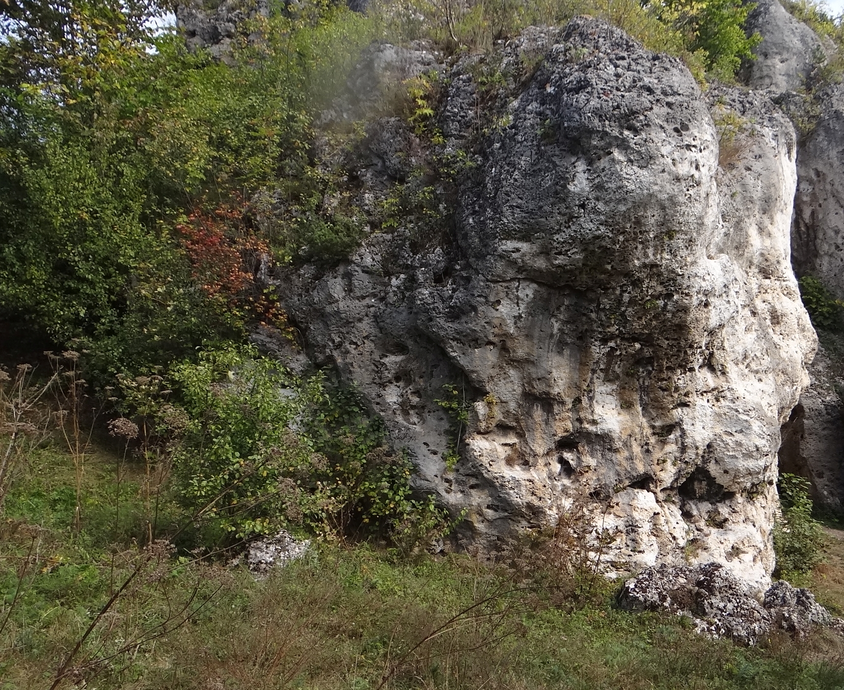 Skała Ule w Łutowcach